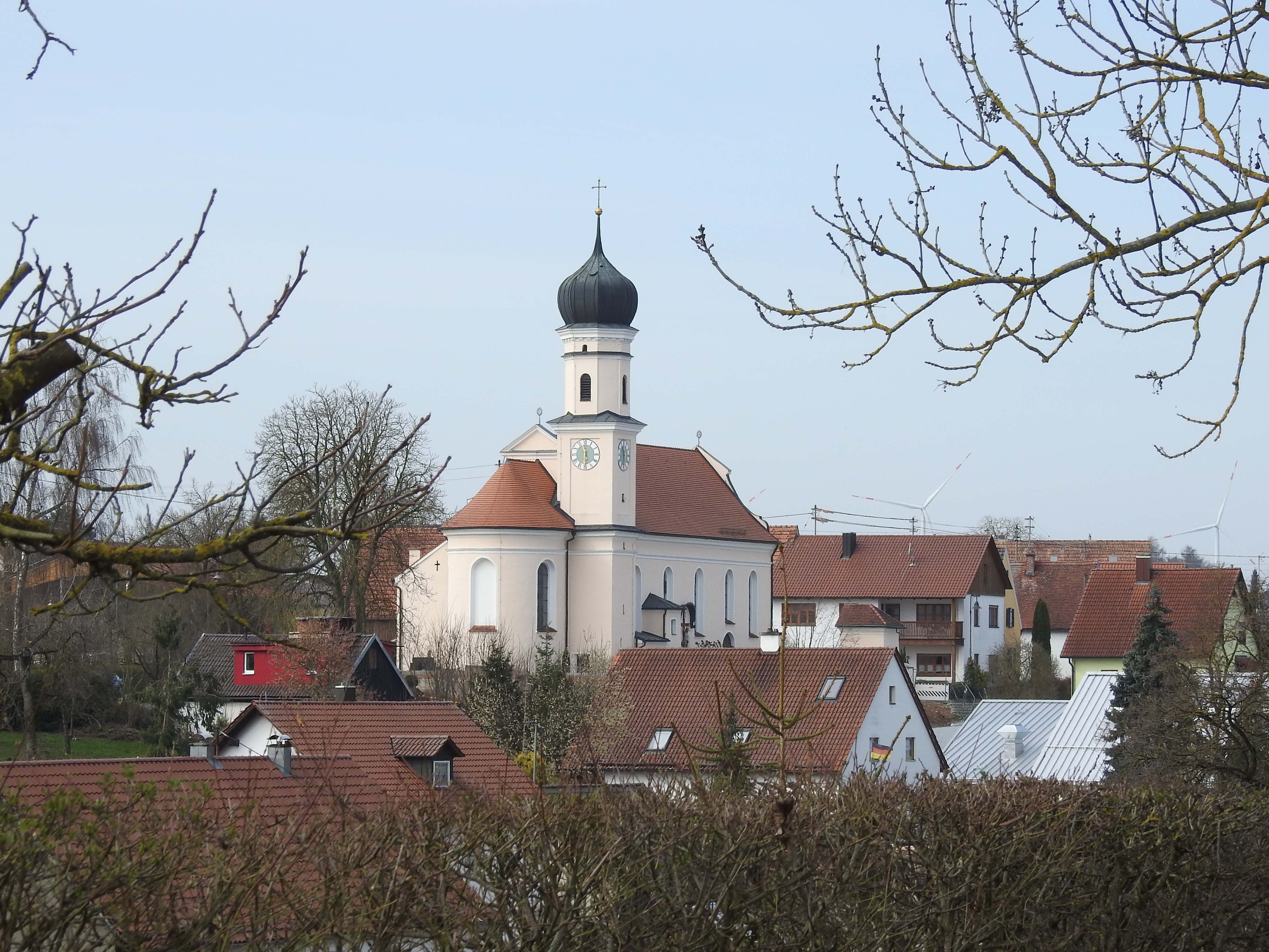 Pfarrkirche in Allmannshofen